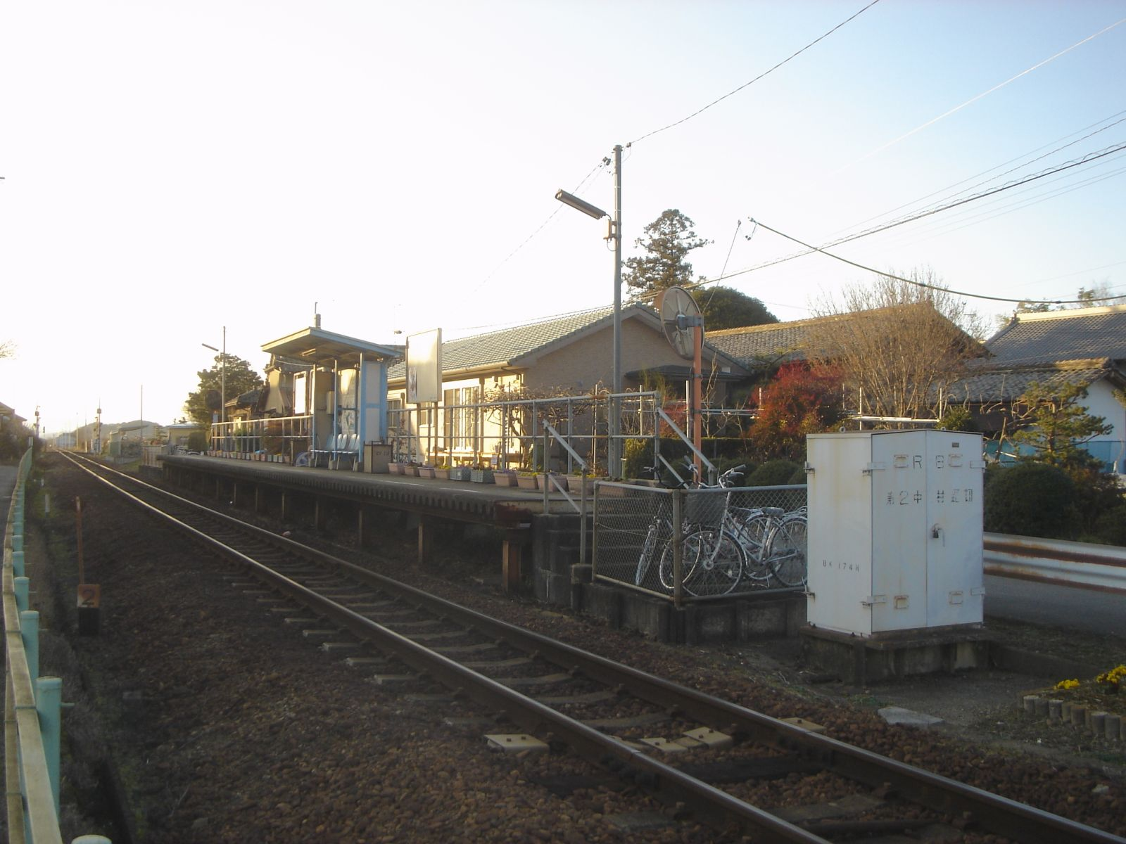 Sekitomioka Station (長良川鉄道越美南線、関富岡駅）,Seki,Gifu,Japan(岐阜県関市)で撮影。